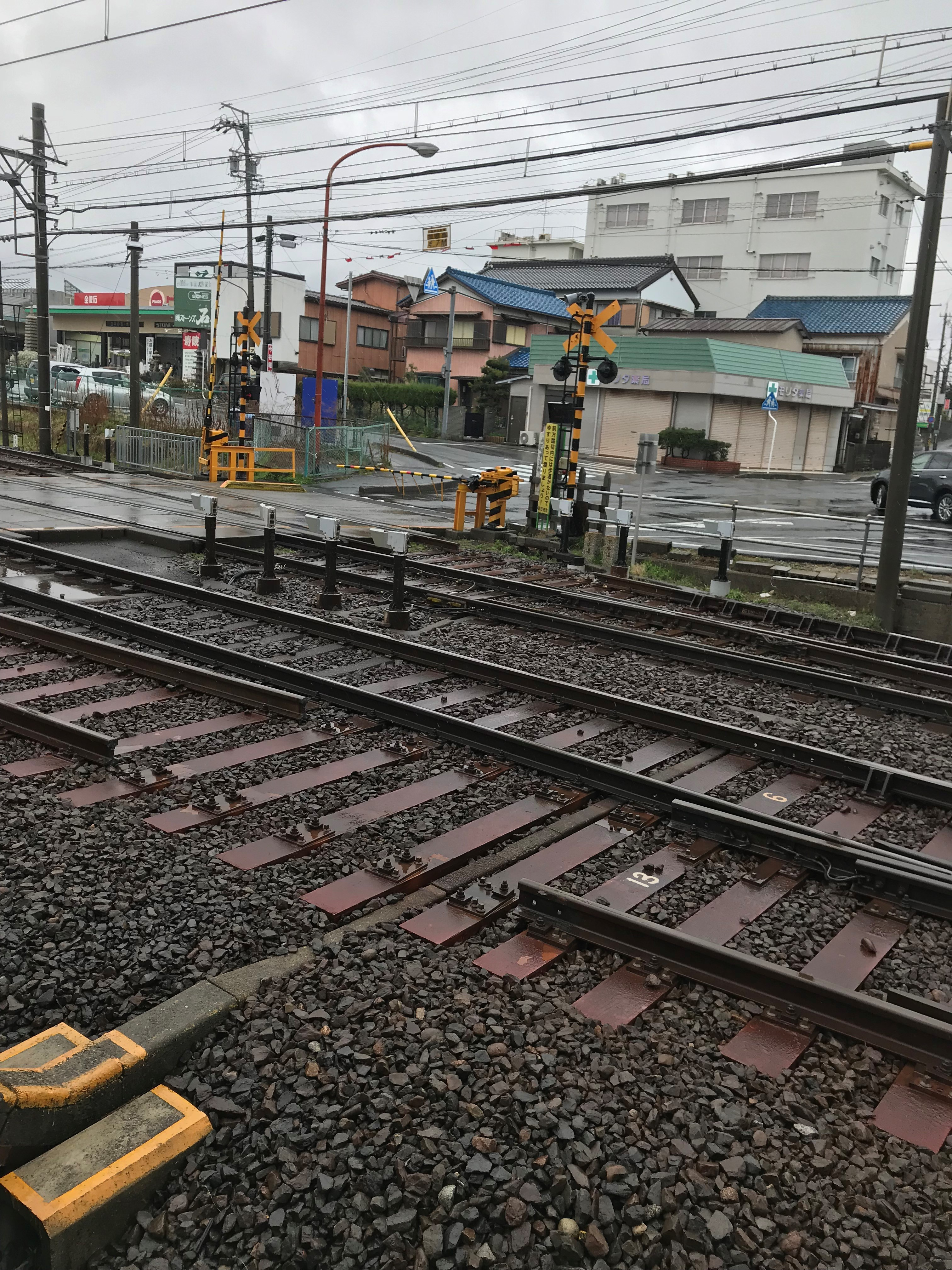 待避線の廃止により切断されたレール